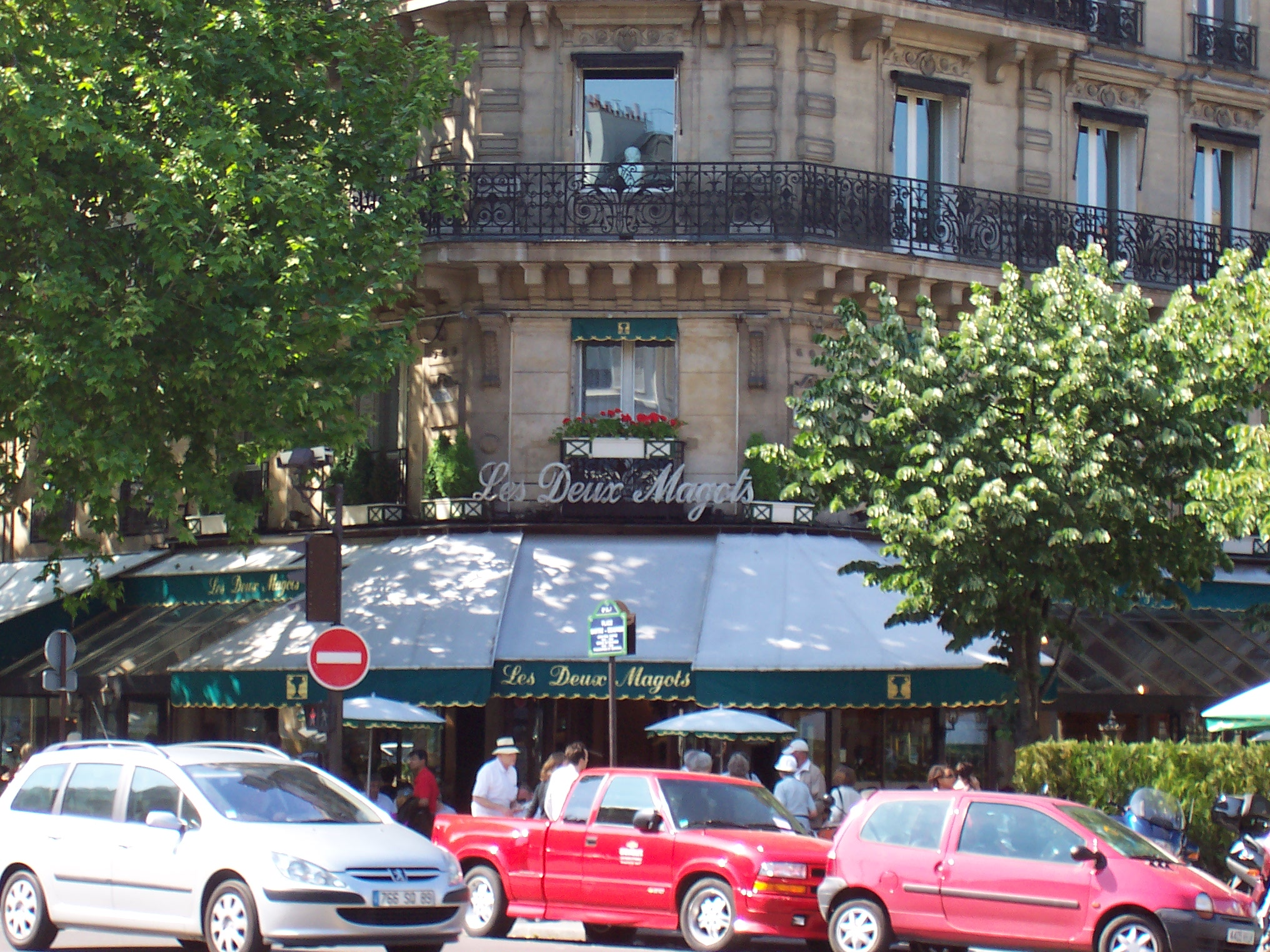 Deux Magots May 2004